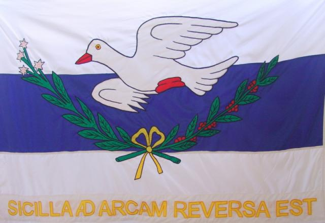 Bandeira da cidade de Nazaré